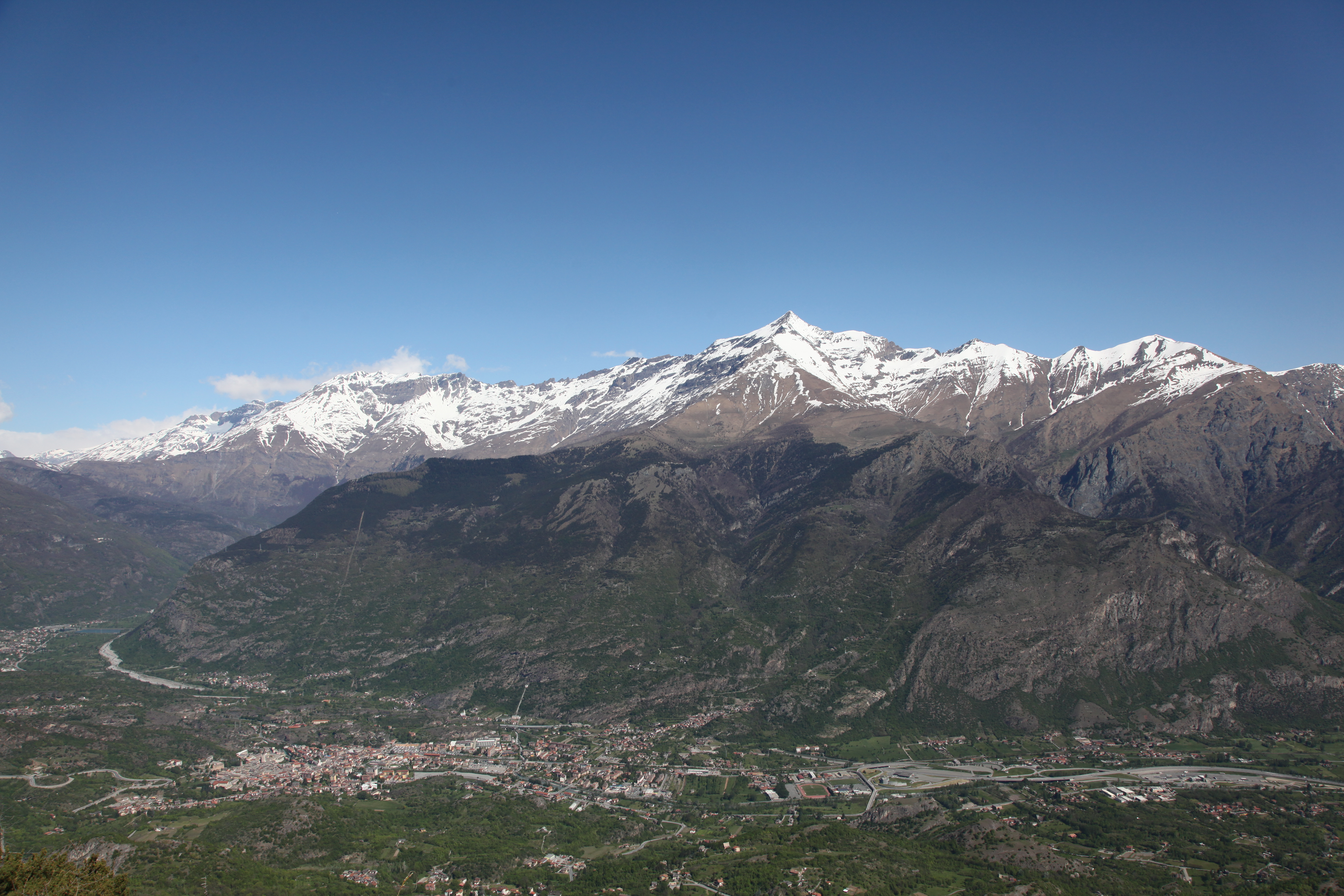 Rocciamelone (Q49964120)